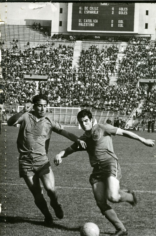 Rubén Marcos - Seleccionado nacional de fútbol 1966